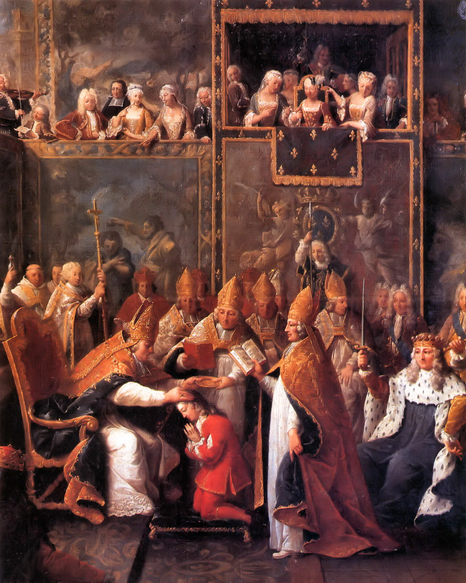 Tableau de Pierre Subleyras. Sacre de Louis XV, 1722 (musée des Augustins, Toulouse).